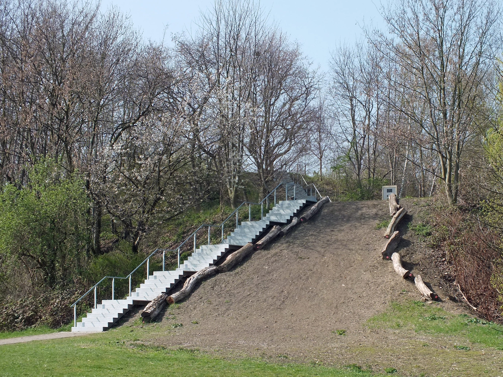 Der Aufgang zum Gedenkort für die Paulinerkirche im Park an der Etzoldschen Sandgrube in Leipzig-Probstheida